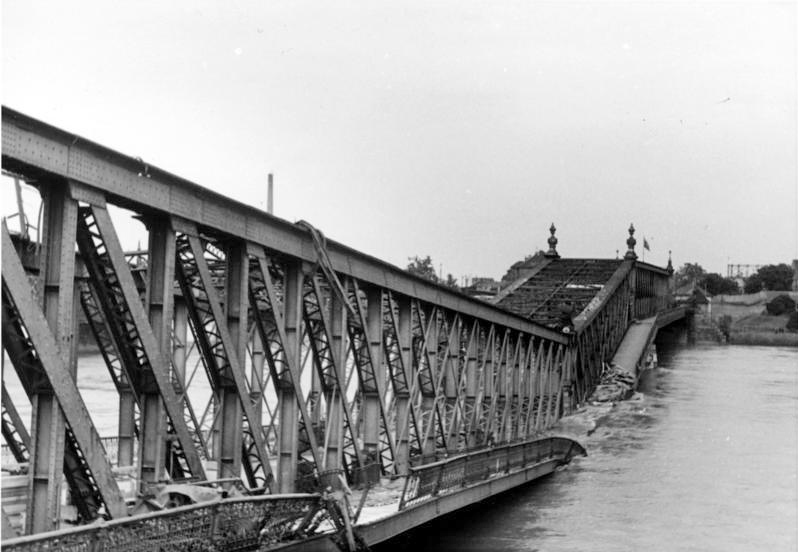 Gesprengte Rheinbrücke bei Kehl